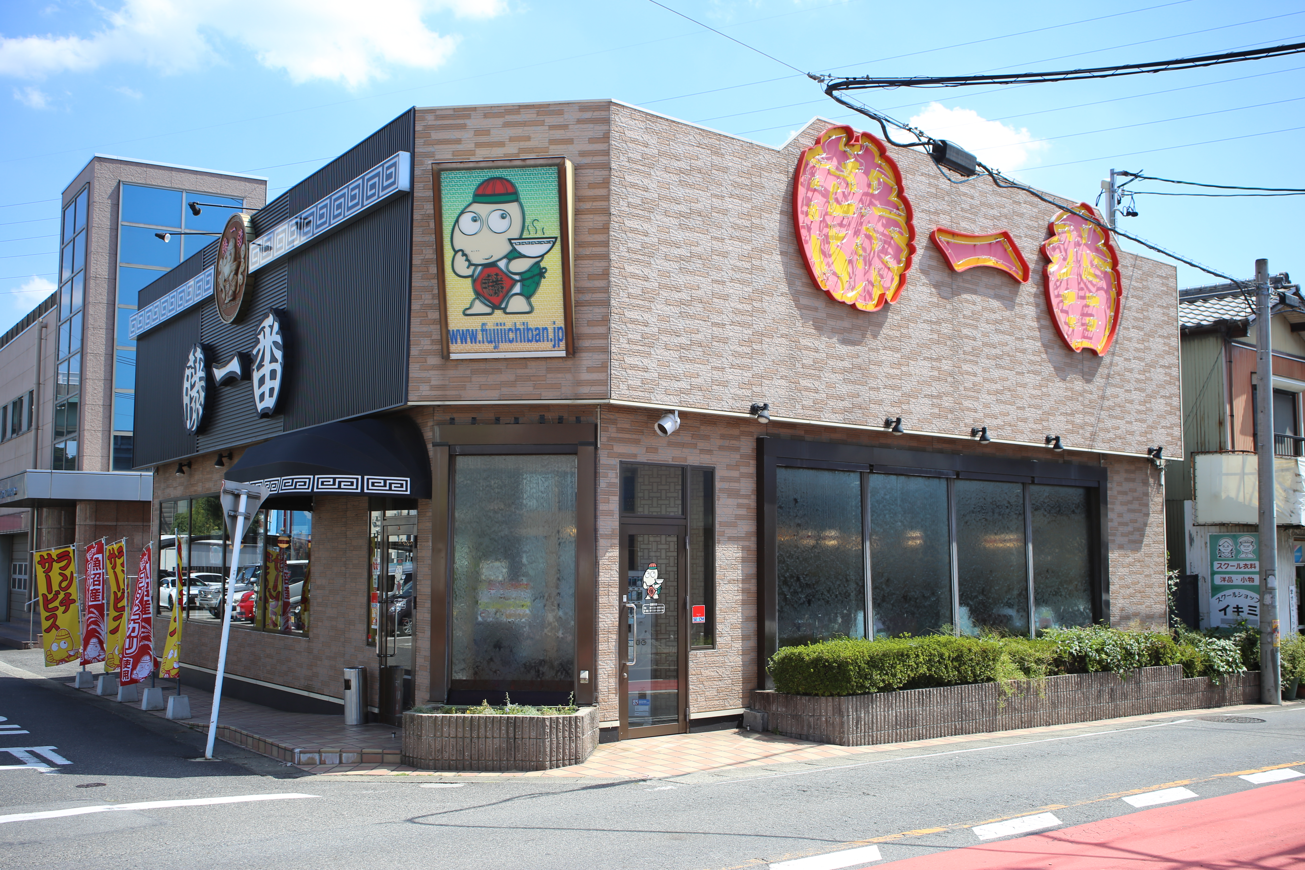 愛知県小牧市の藤一番小牧インター店